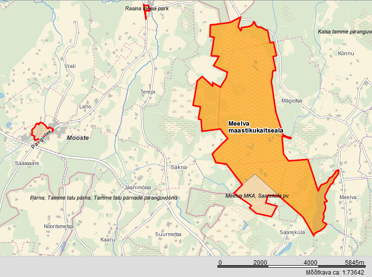 Meelva MKA kaart. Põhineb Maa-ameti kaardil.